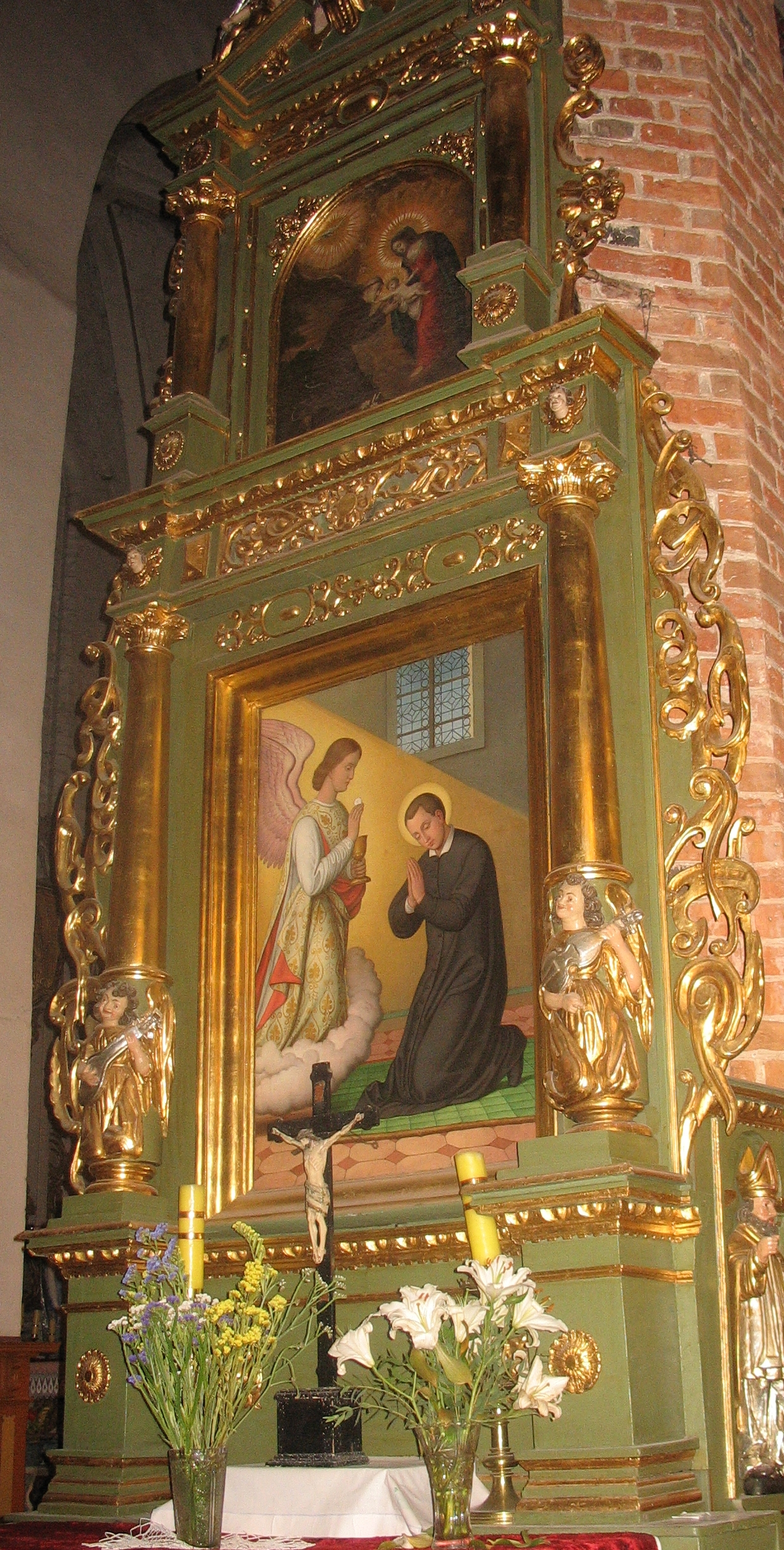 Ołtarz św. Stanislawa Kostki w Gniewie